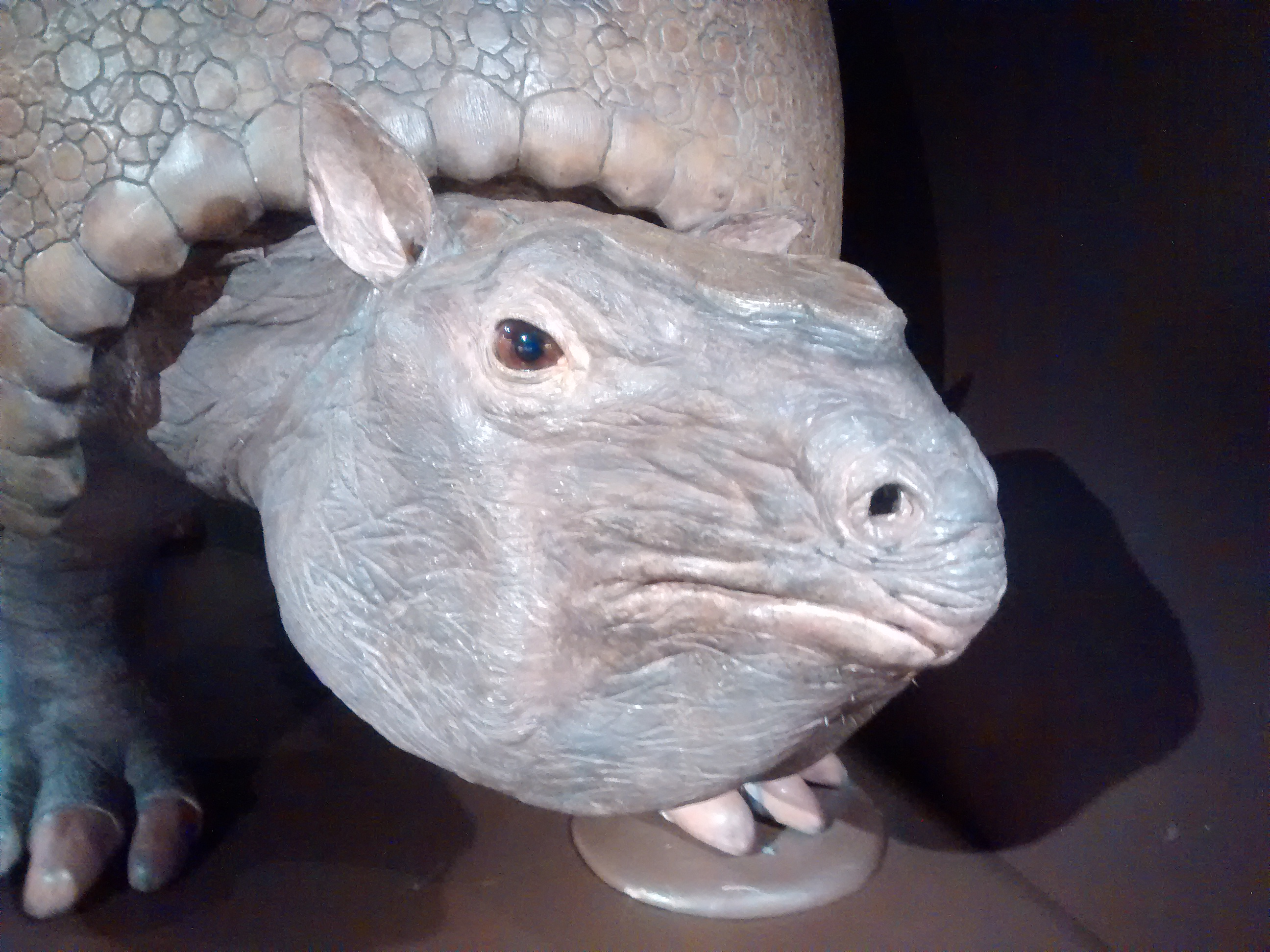 Glyptodon-Nachbildung im Museum Mensch & Natur, München.